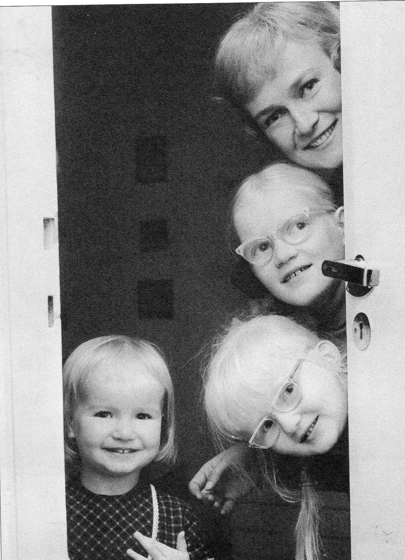 Suomalainen näyttelijä Elina Pohjanpää (1933–1996) lastensa (vasemmalta lukien) Paulan (s. 1963), Hanna-Marin (s. 1960) ja Tarjan (s. 1957) kanssa.